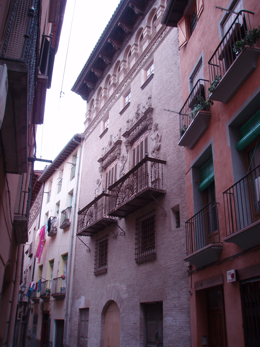 La Casa del Almirante (Tudela), en 2007